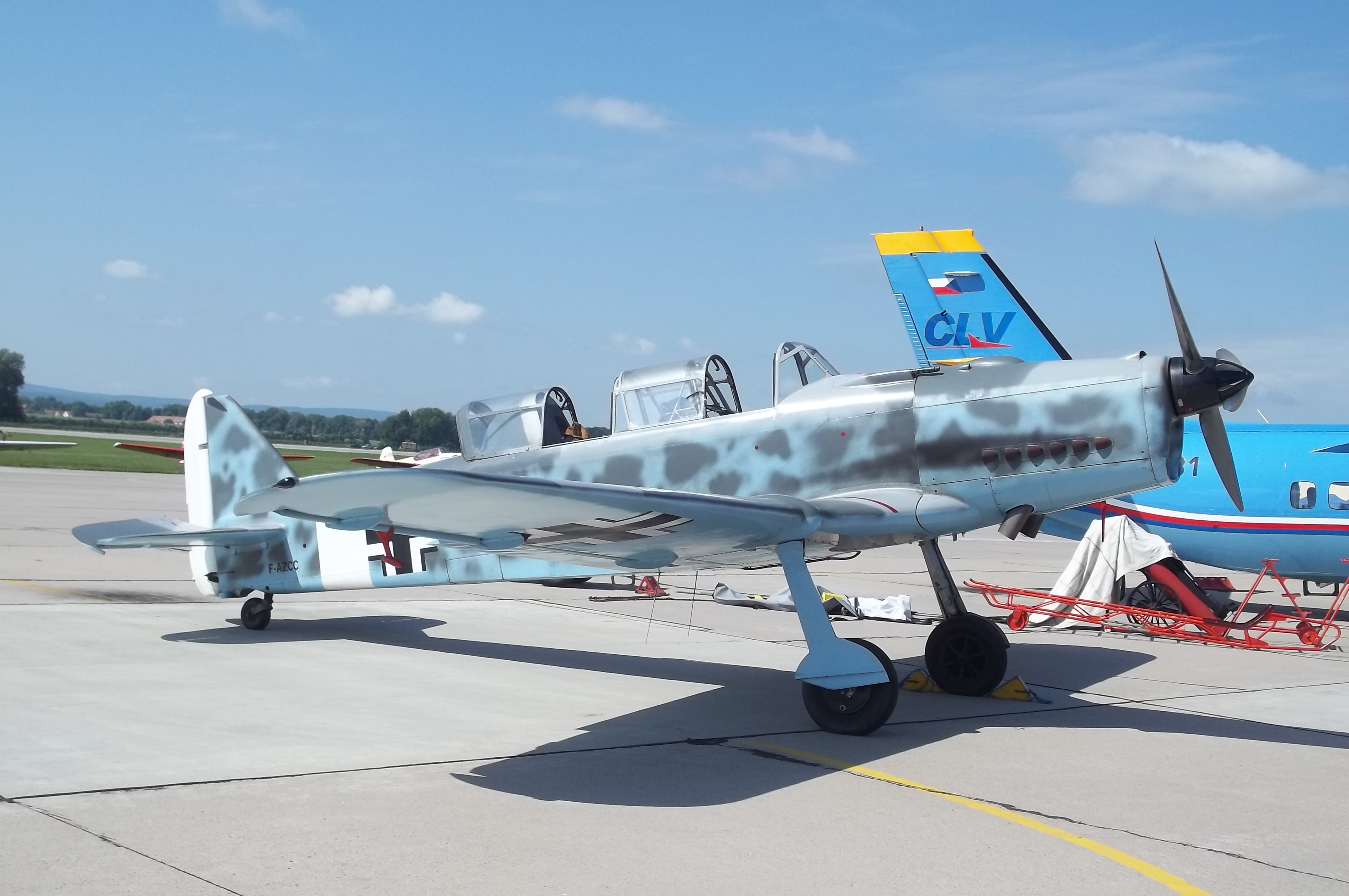 Pilatus P-2